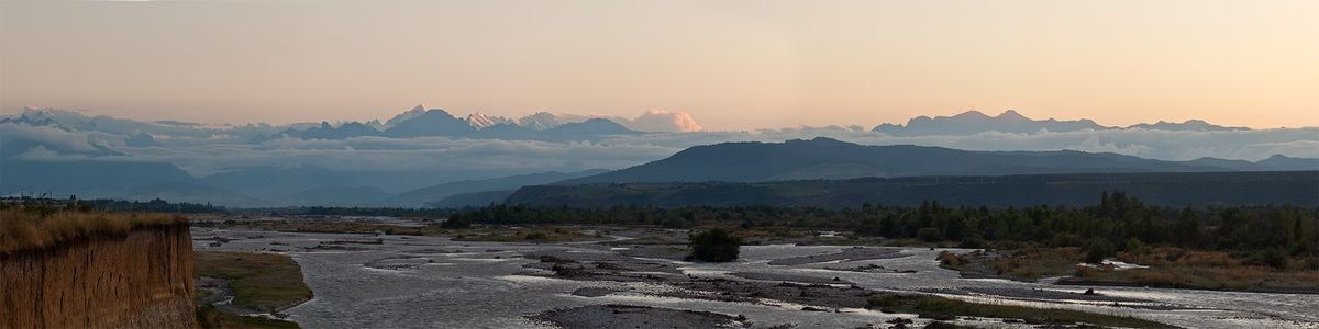 Река Черек у села Старый Черек